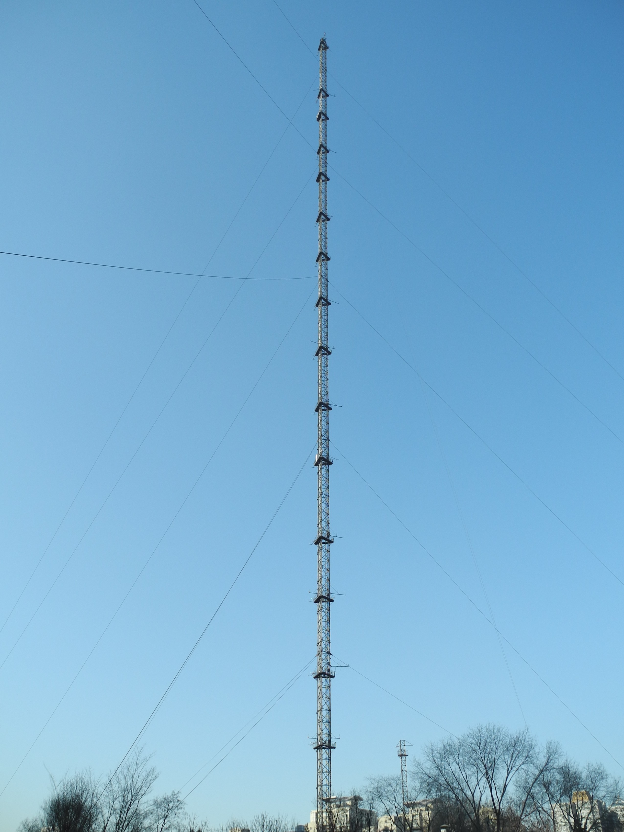 Der IAP-Messmast in Peking, VR China von Süden aus gesehen